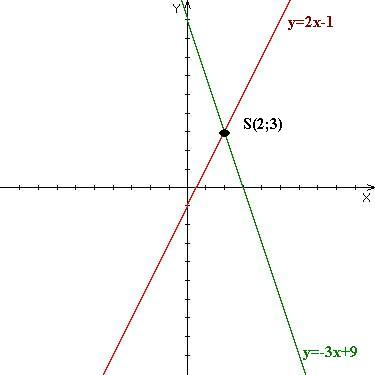 Darstellung zweier linearer Funktionen im kartesischen Koordiantensystem.